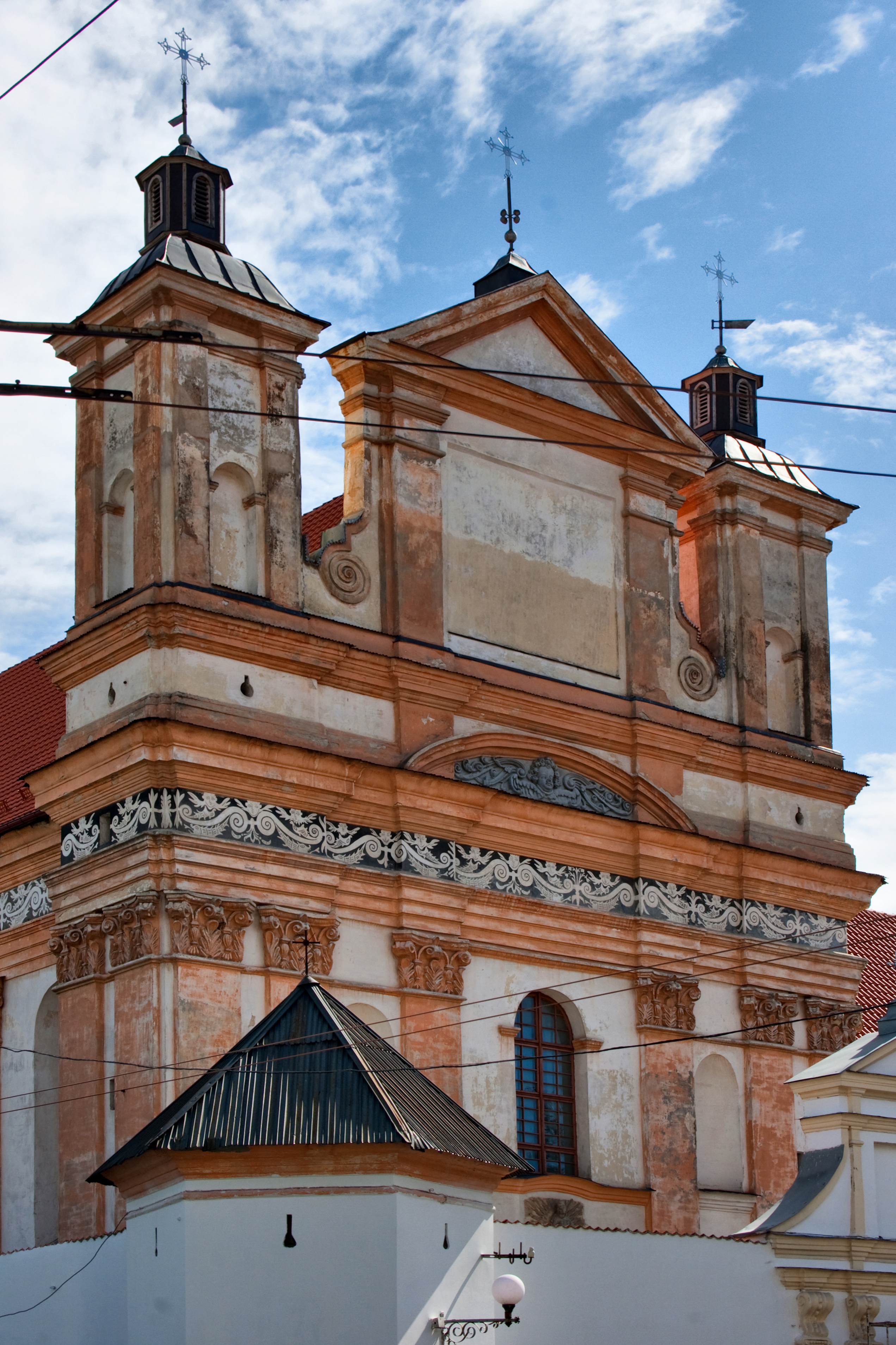 Беларуская (тарашкевіца): Ансамбль былога кляштара брыгітак:касьцёлжылы корпуслямусагароджа з брамай. г. Горадня This is a photo of Belarusian heritage monument. Reference number: 412Г000017 ( WLM)